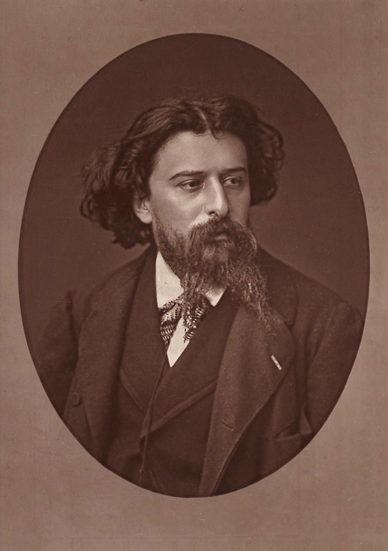 Photographie d'Alphonse Daudet par Ferdinand Mulnier dans l'hebdomadaire Paris-Portrait (ancien Paris-Théâtre), n°262, 14 mars juin 187_.. Photoglyptie (woodburytype) par Alfred Lemercier.